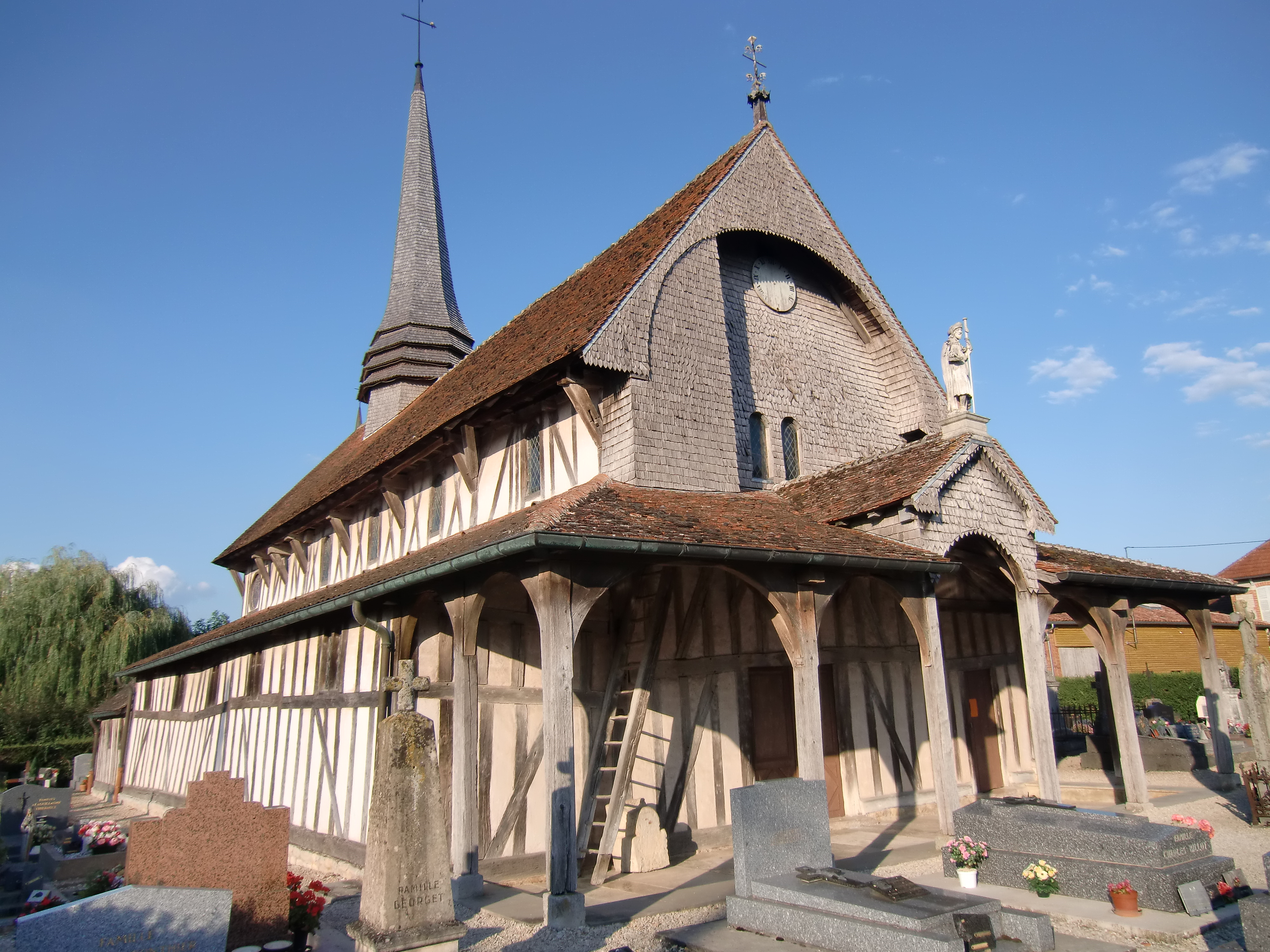 Eglise Saint Jacques et St Philippe de Lentilles (Aube - Champagne - France) édifice à pans de bois de la région du Der